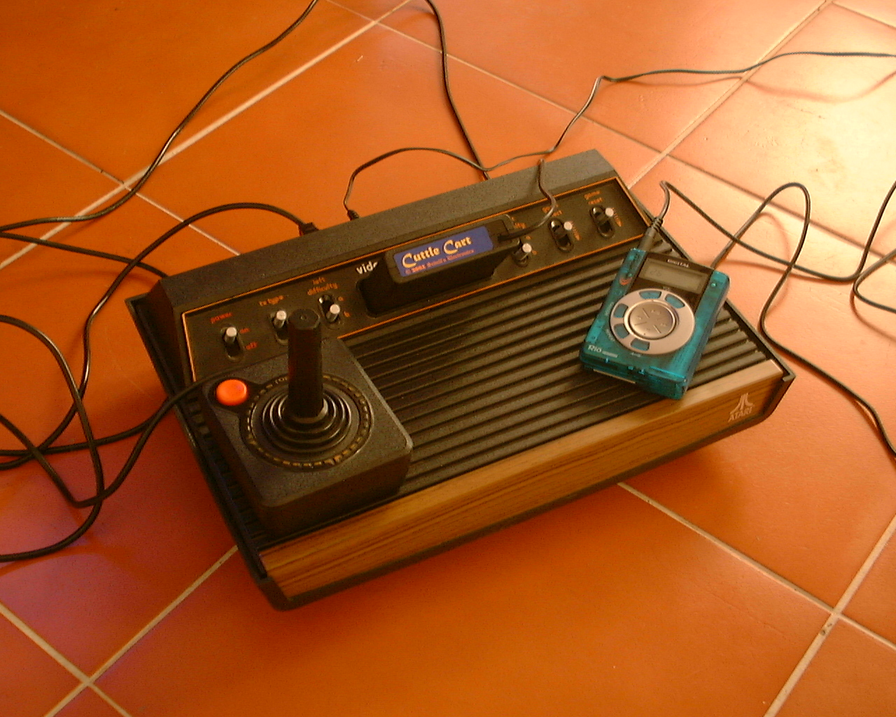 Atari game console